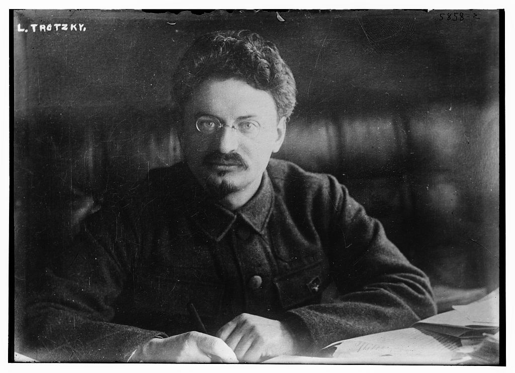 Trotsky de frente en escritorio